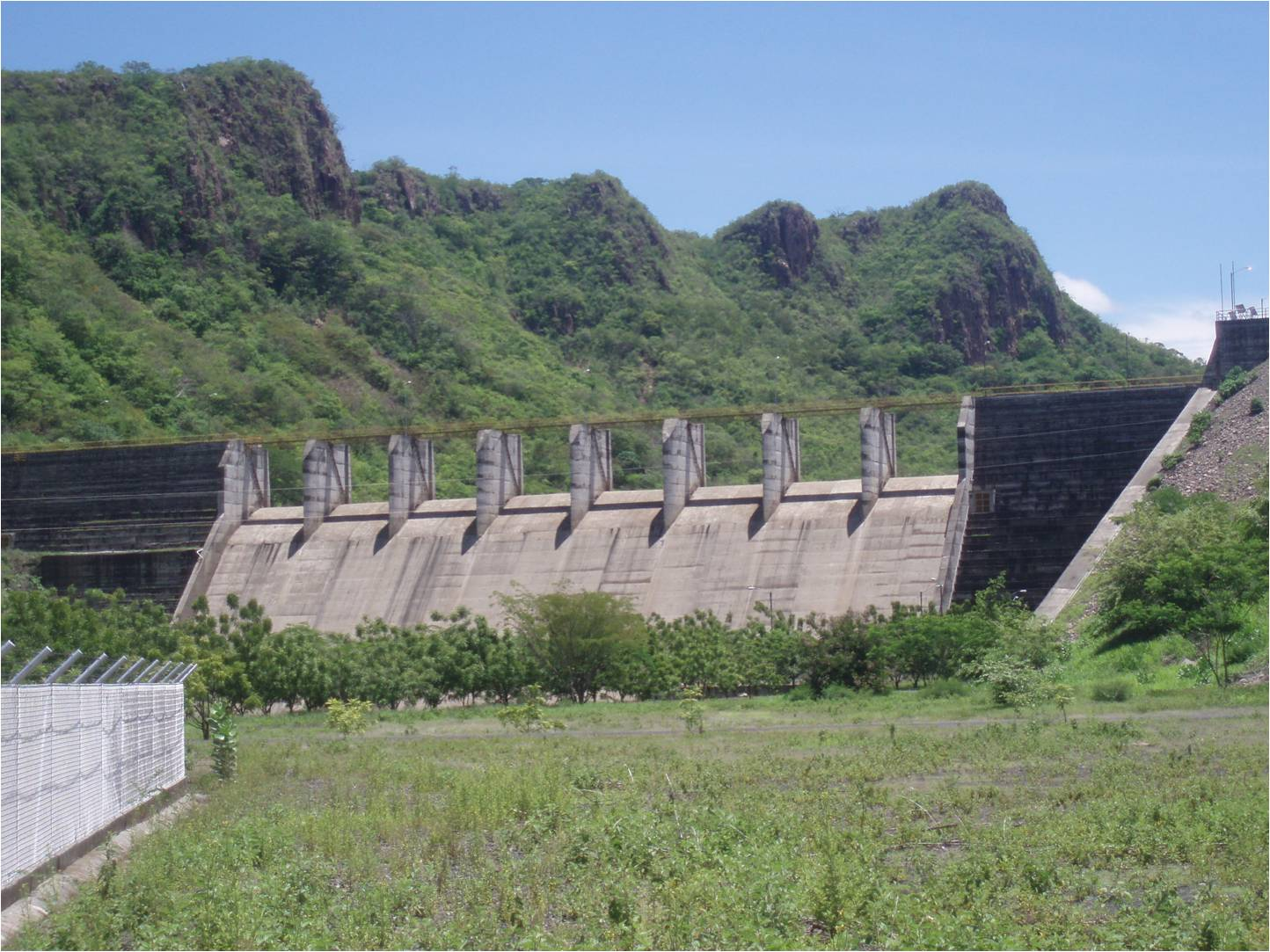 Vista desde aguas abajo de la represa construida sobre el río Nacaome en el año 2000. En su primera etapa de operación, aun sin compuertas.